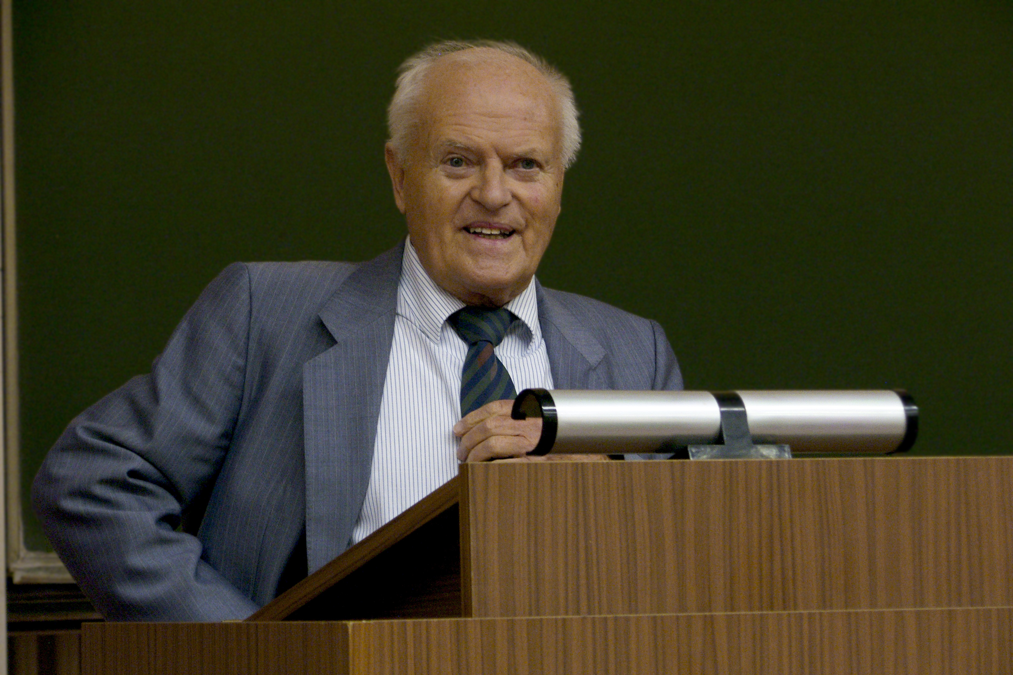 Eröffnung der Posterschau in der Physik der TU-Berlin durch Dr. Jost Lemmerich am 17.10.2008, Foto Thilo Rückeis